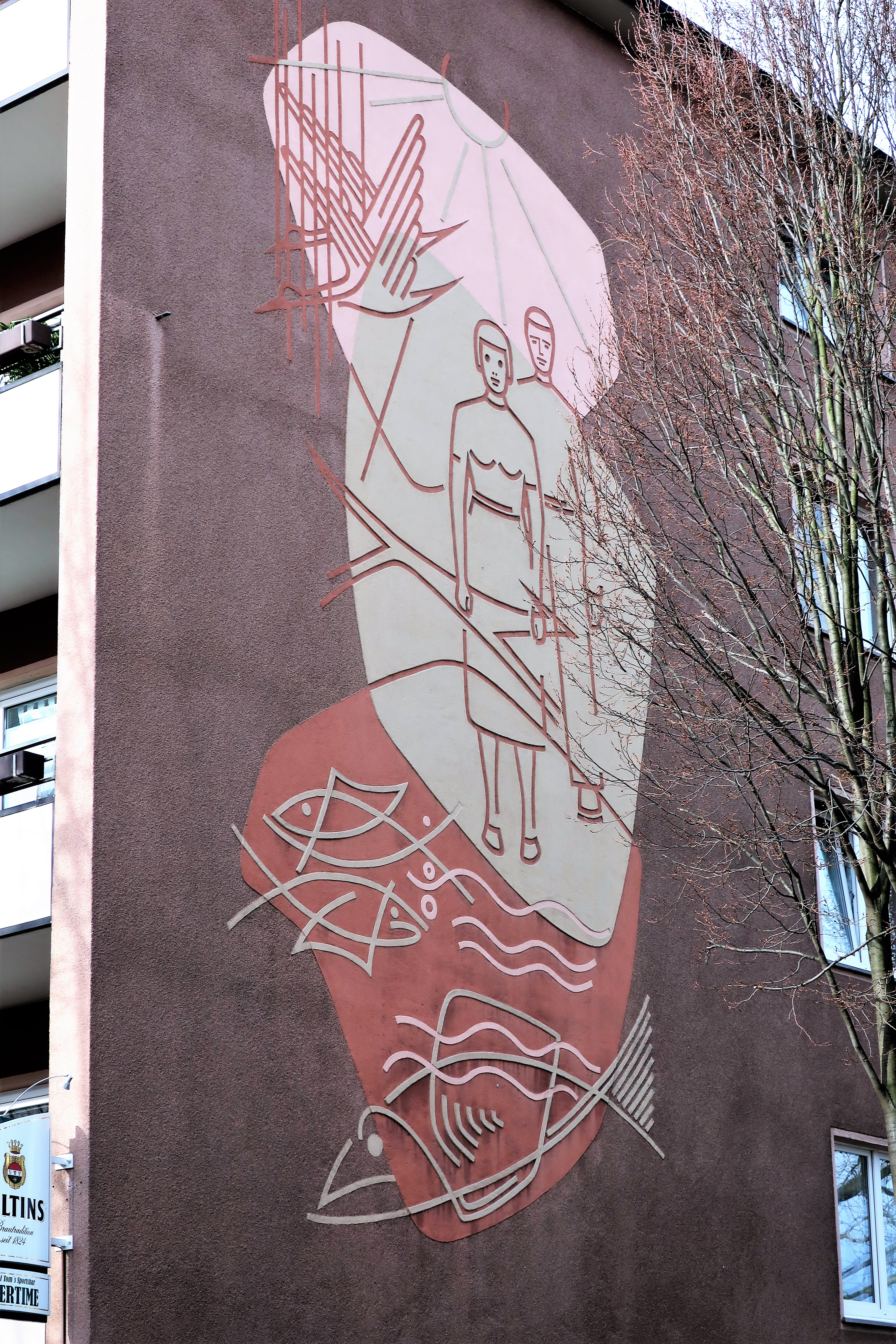 Sgraffito an Hauswand Springe 8-10 in Hagen. „Die drei Elemente“, 8 x 4,50 m. Erschaffen ca. 1955 von Elisabeth Altenrichter-Dicke. Kunst im öffentlichen Raum in Hagen.